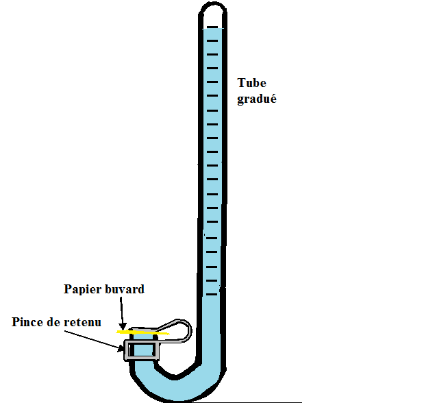 Évaporomètre de Piche : un tube gradué rempli d'eau et fermé à un bout par un papier buvard. L'eau du tube garde le papier humide en remplaçant l'eau qui s'évapore dans l'air. Les graduations permettent de suivre le taux d'évaporation